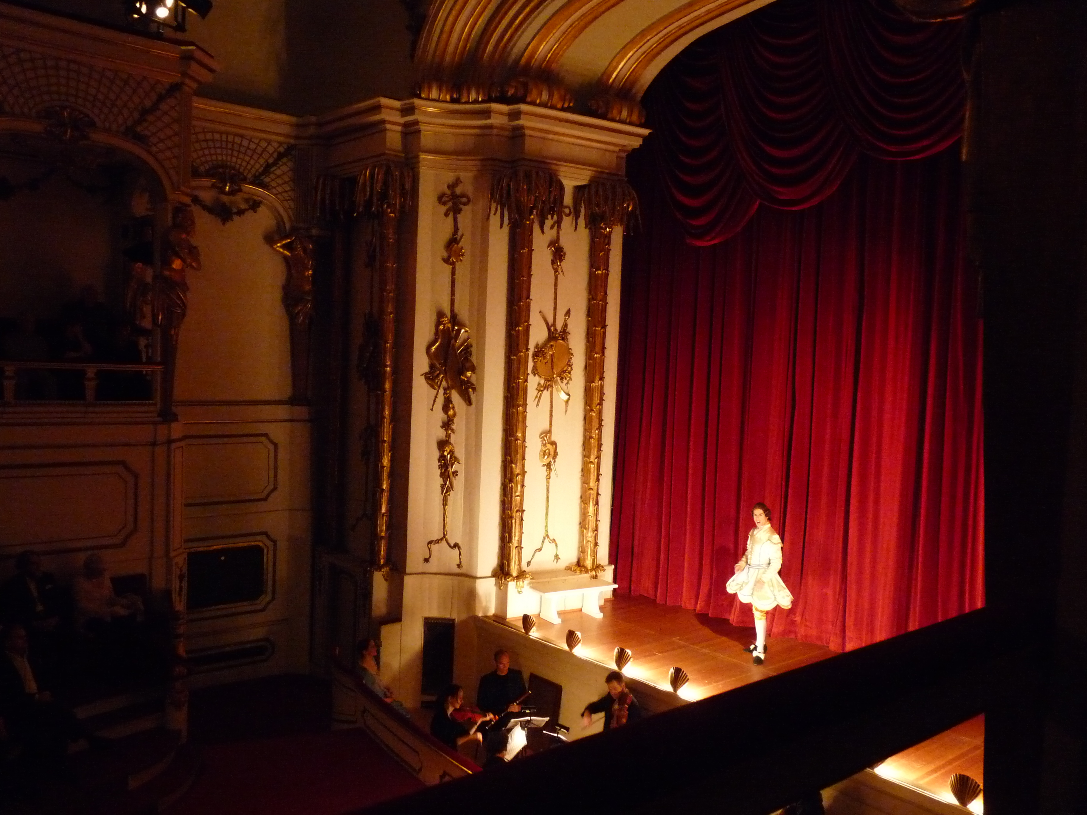 Rokoko Theater Neues Palais Sanssouci Potsdam